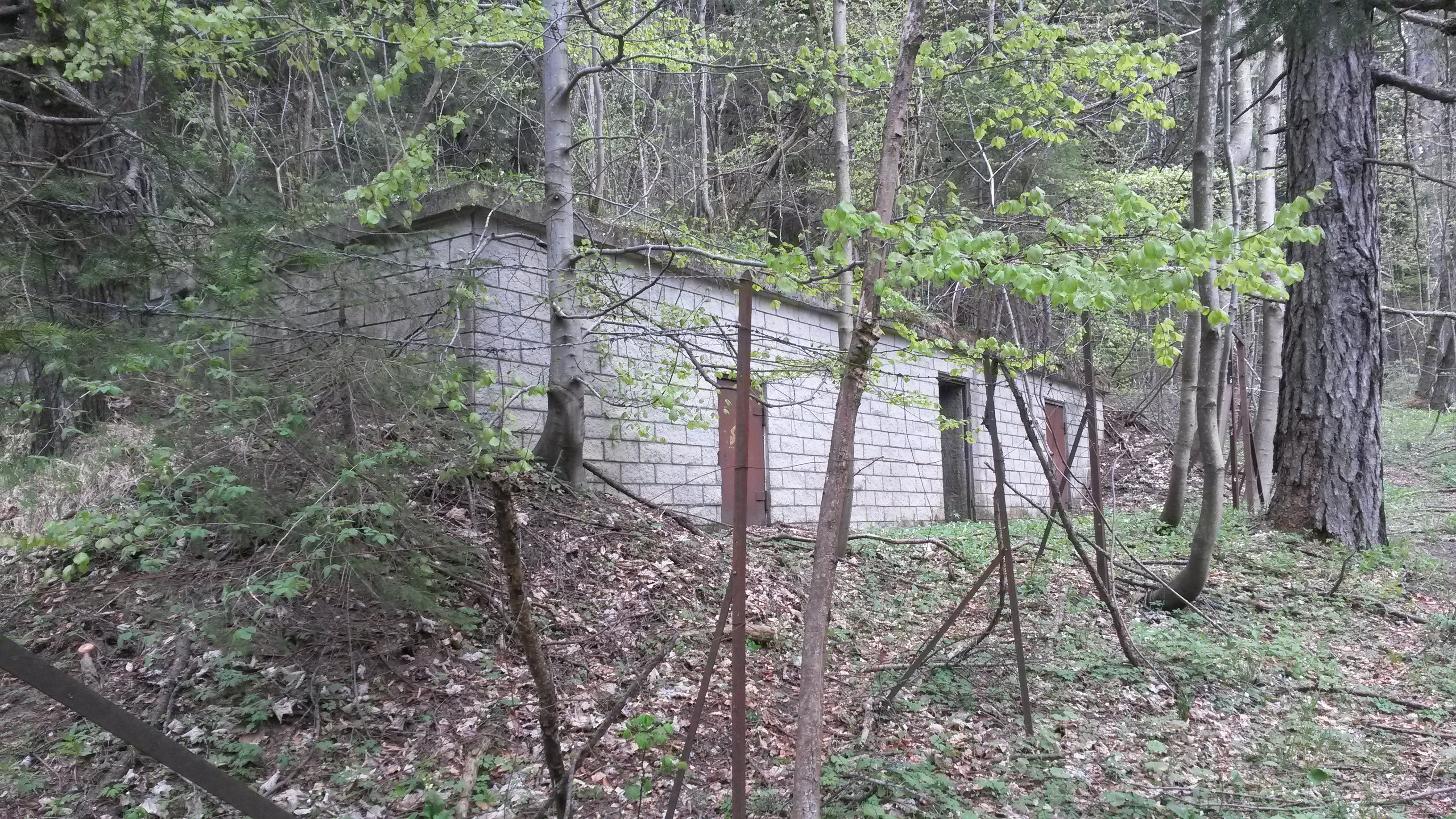 Ruine des Alpenstrandbades Semmering (Österreich): Brunnenhaus